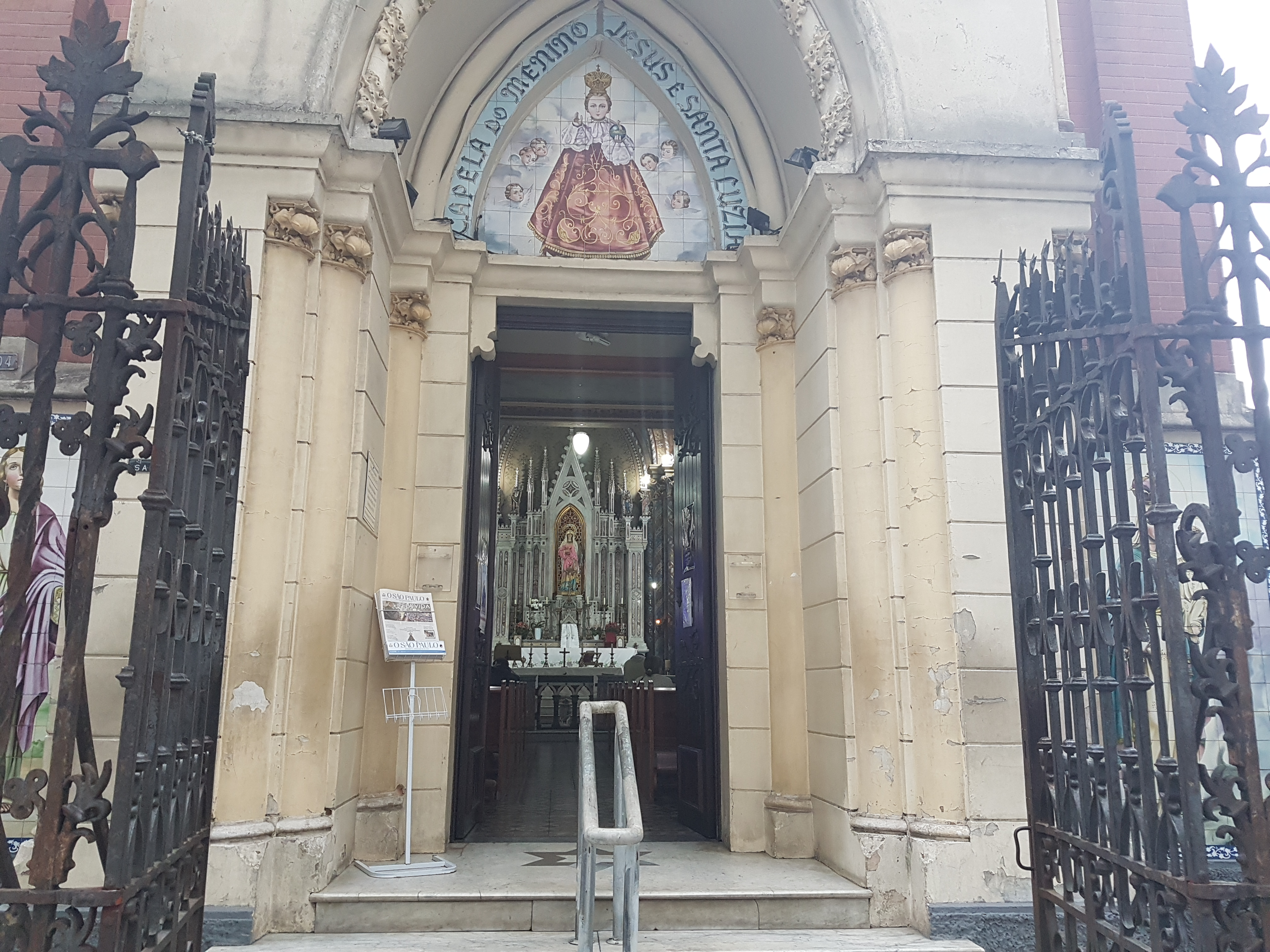 Capela do Menino Jesus e Santa Luzia, situada na Rua Tabatringuera, 104, região da Sé.